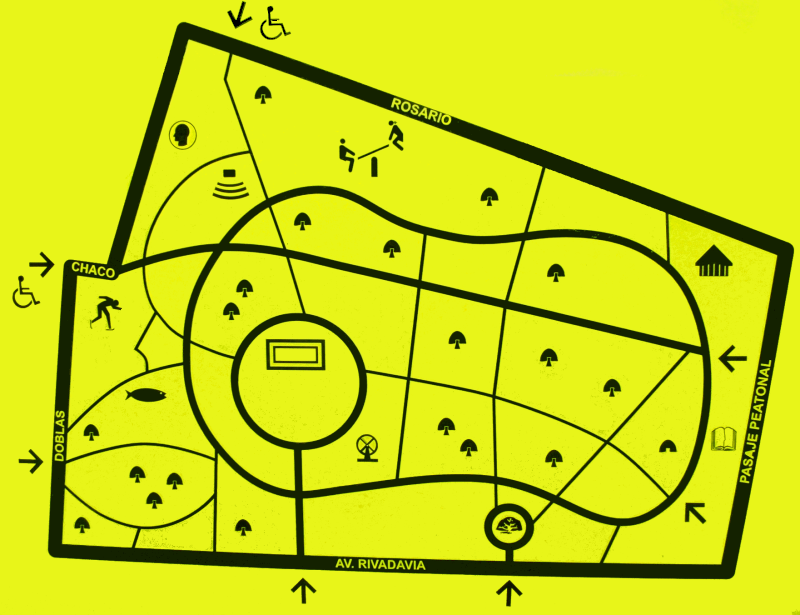 Mapa del Parque Rivadavía